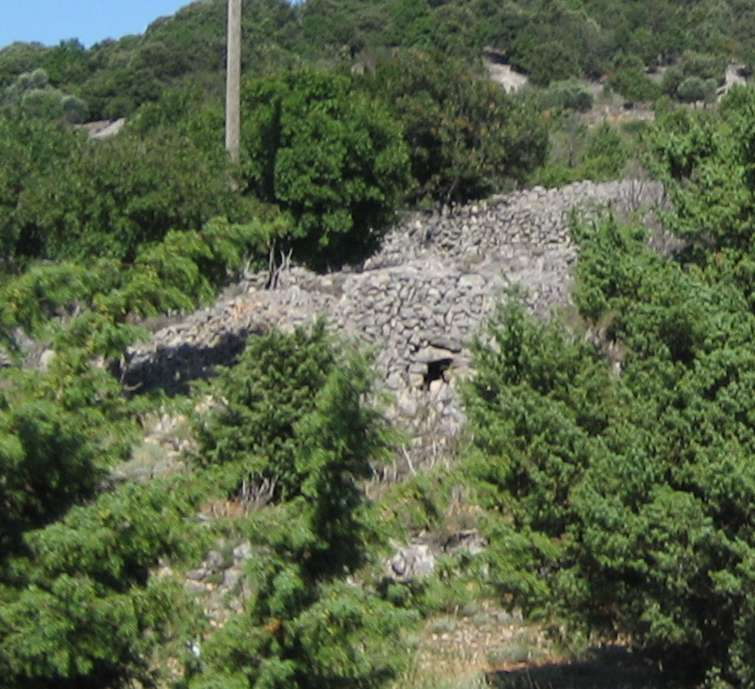 Komarda Hirten Unterstand. Cres, Kroatien